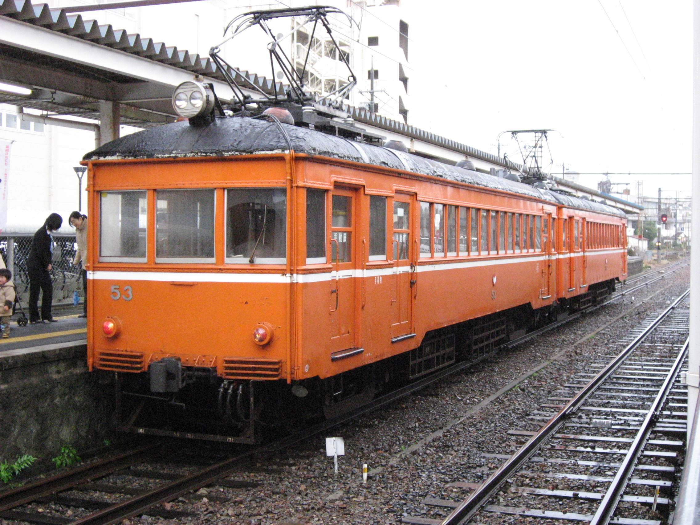 一畑電車デハニ50形電車。